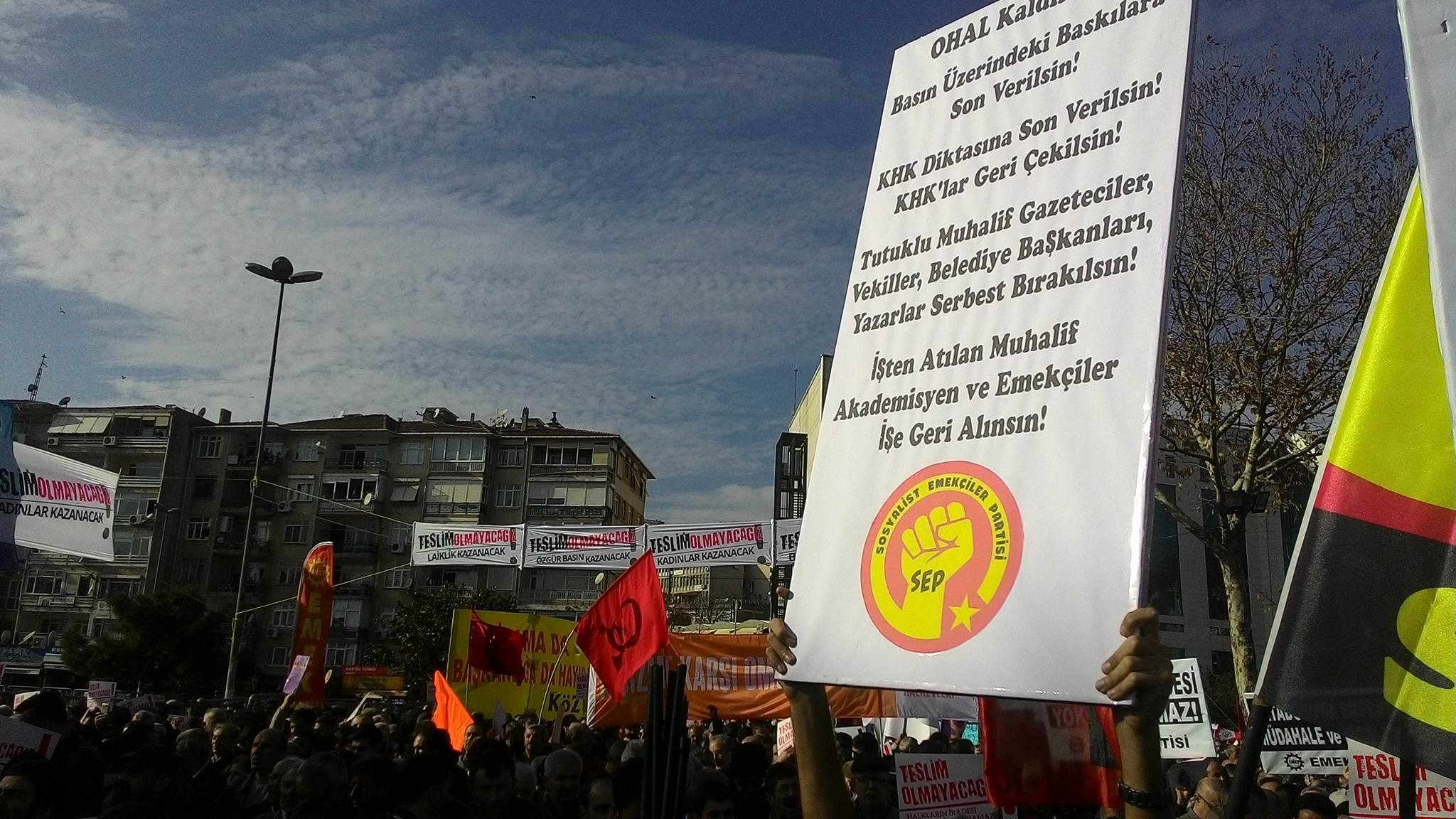 İstanbul/Kartal'da gerçekleştirilen "Teslim Olmayacağız" mitinginden bir kare.